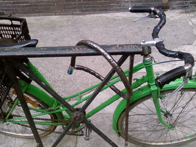 Antivol de vélo type "Boa"